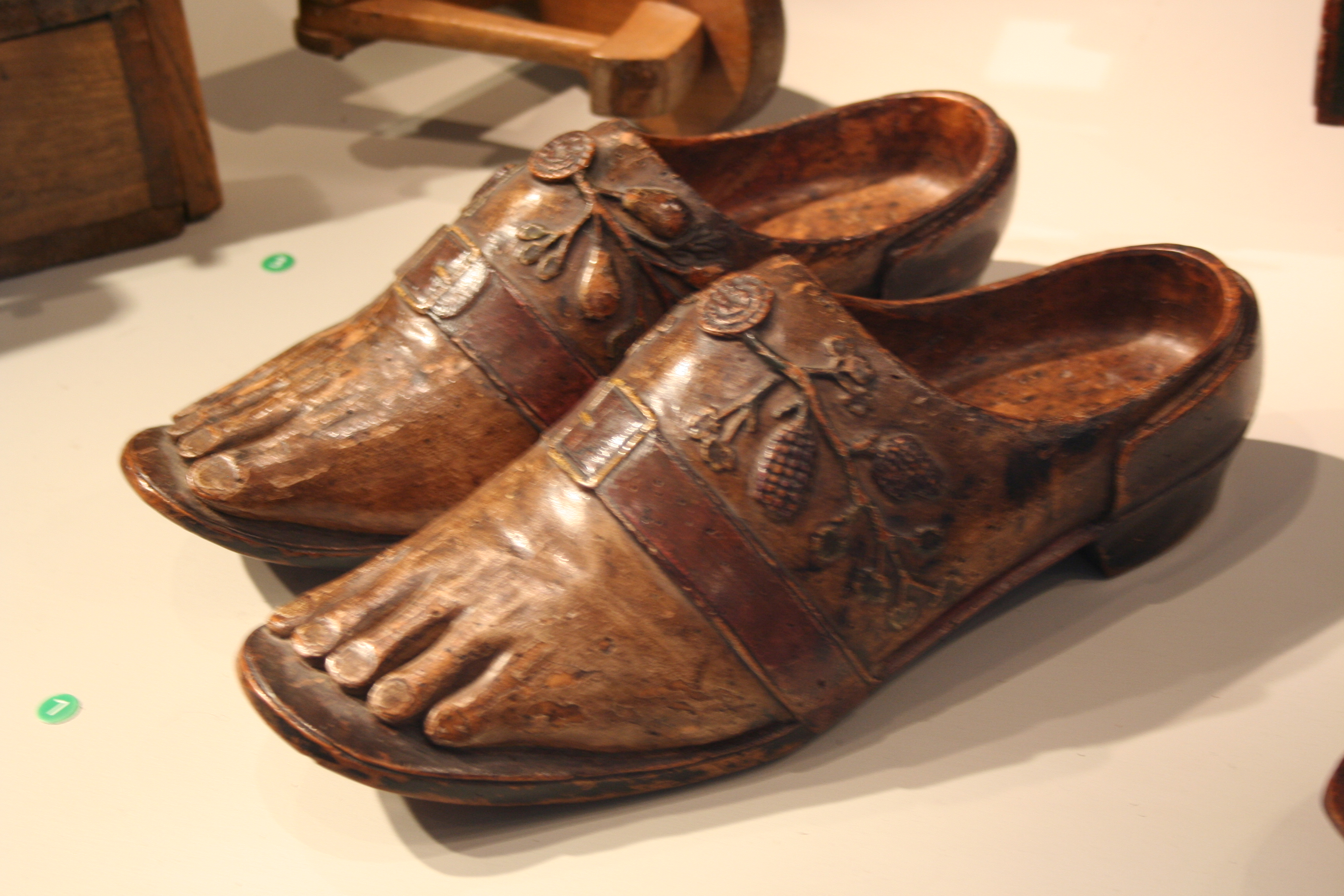 sabots sculptés